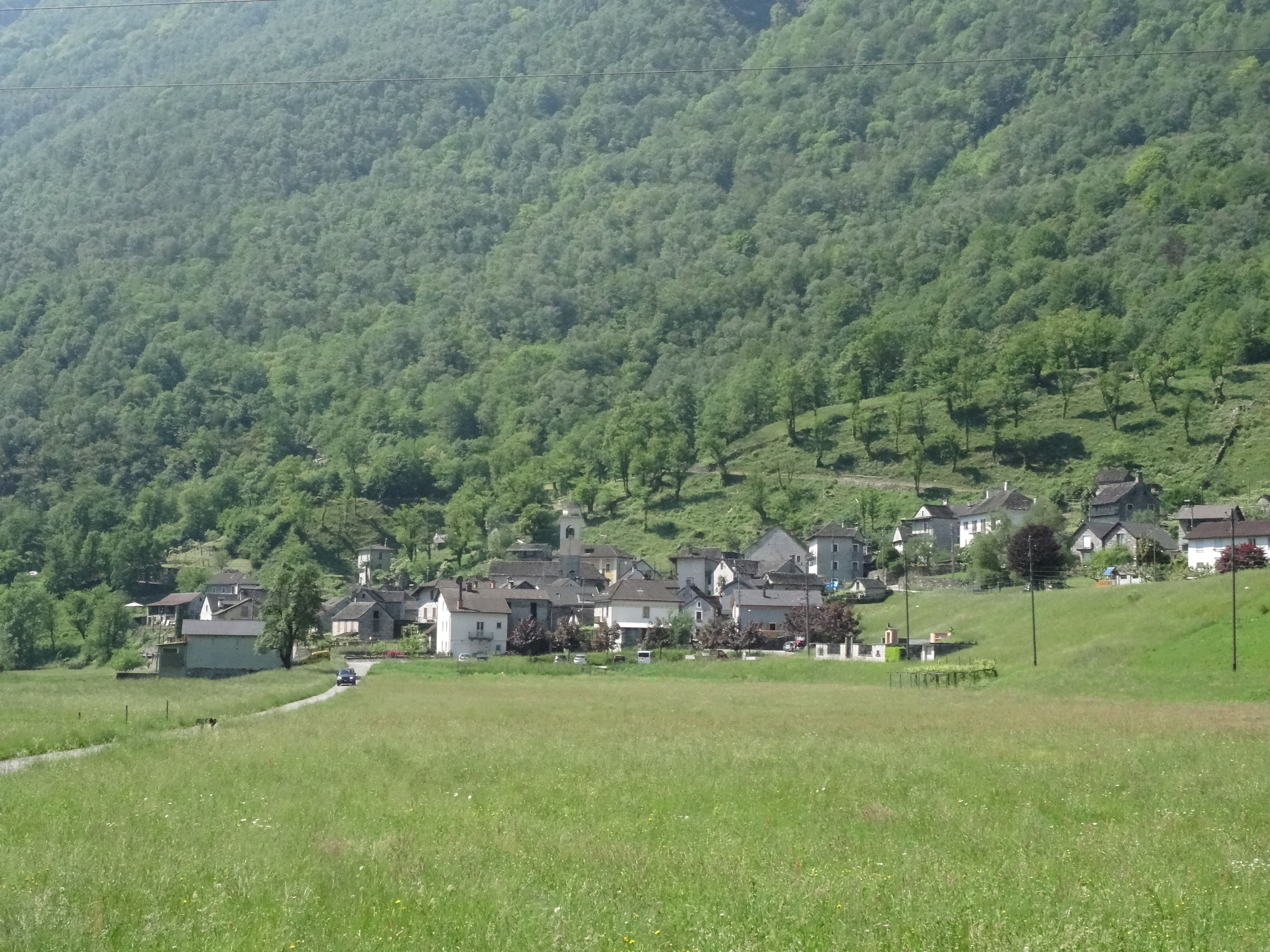 Lodano Mai 2015